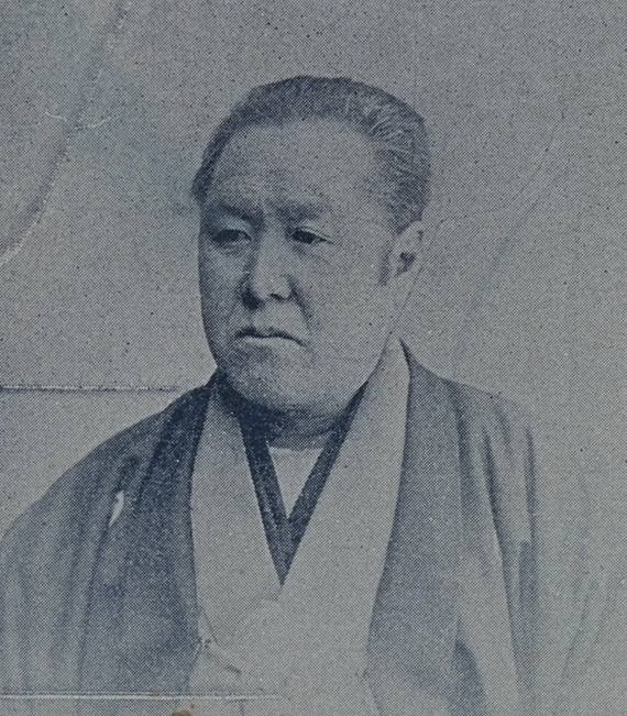 五十嵐甚蔵（1873～1935）